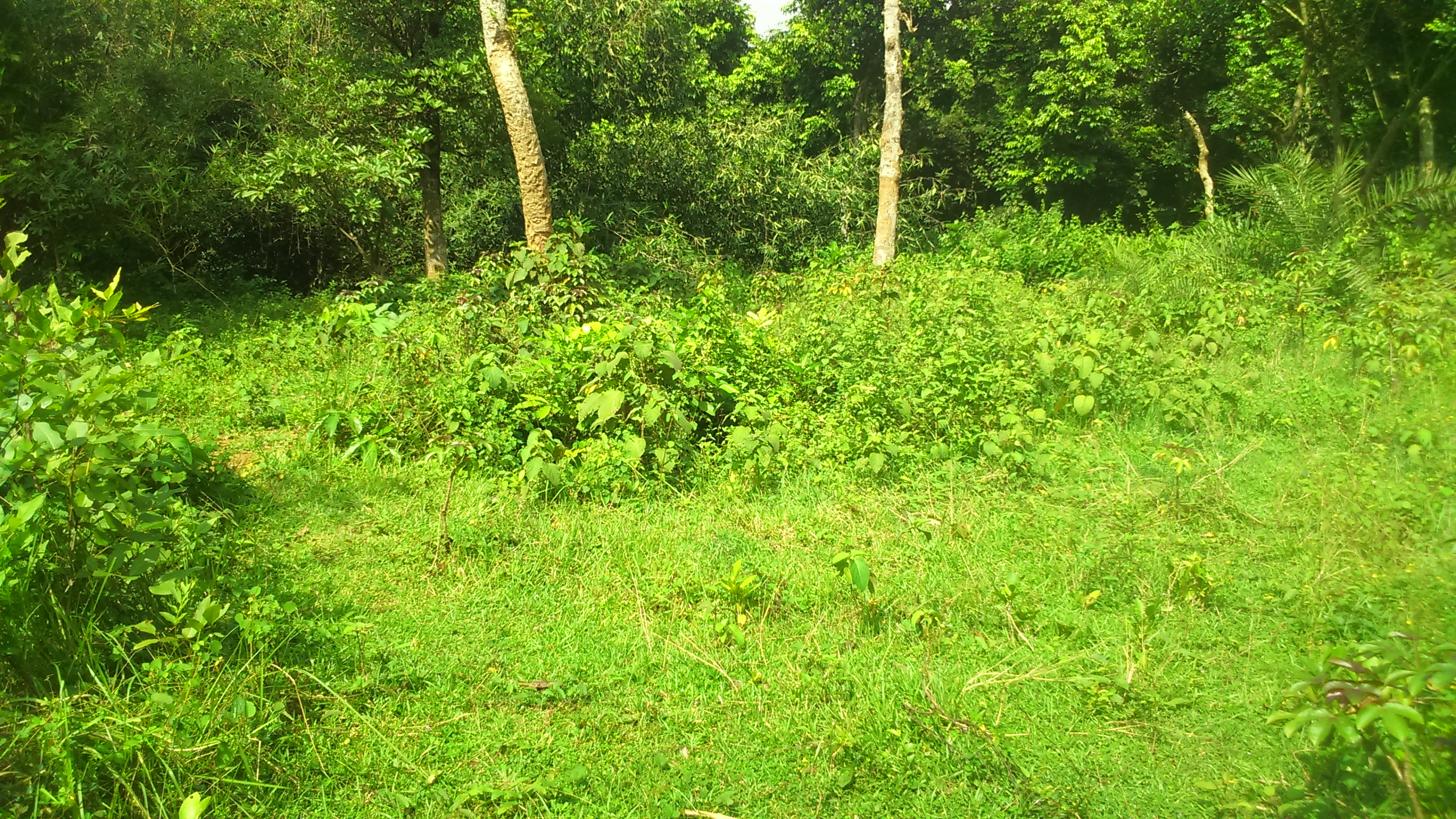 সন্ন্যাসীর ধাপ- ২নং (বড় টেংরার ধাপ)